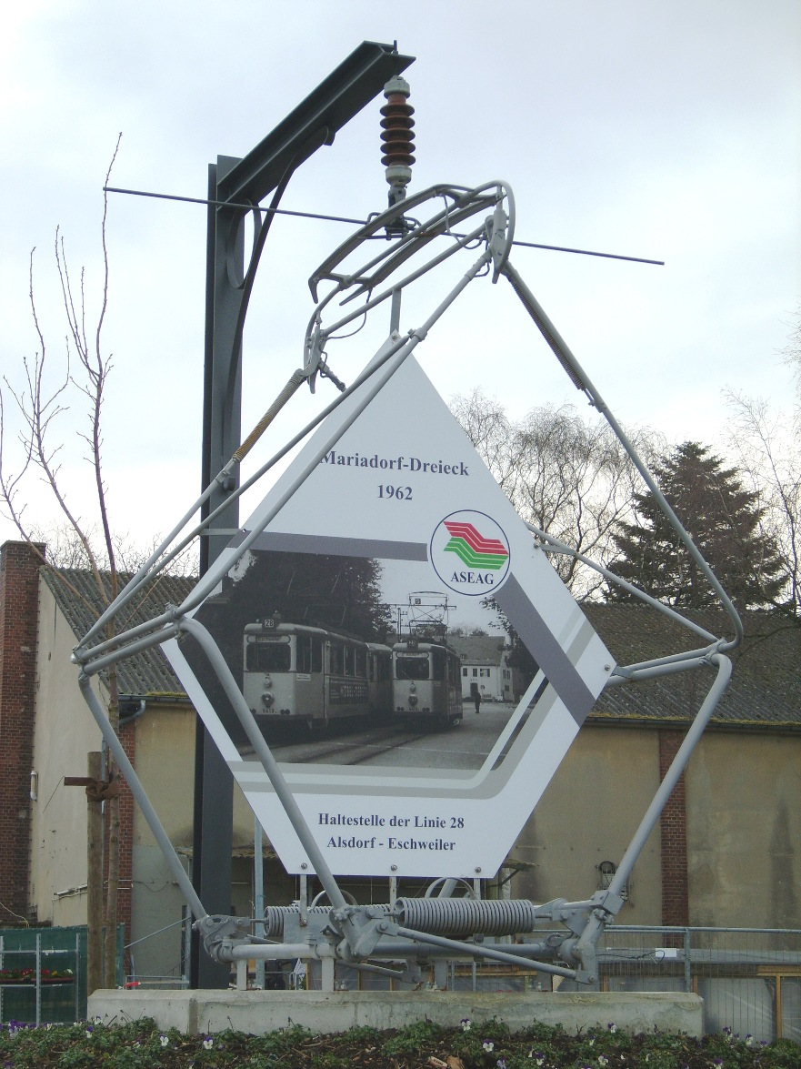 ASEAG-Schild am Mariadorf Dreieck in Alsdorf